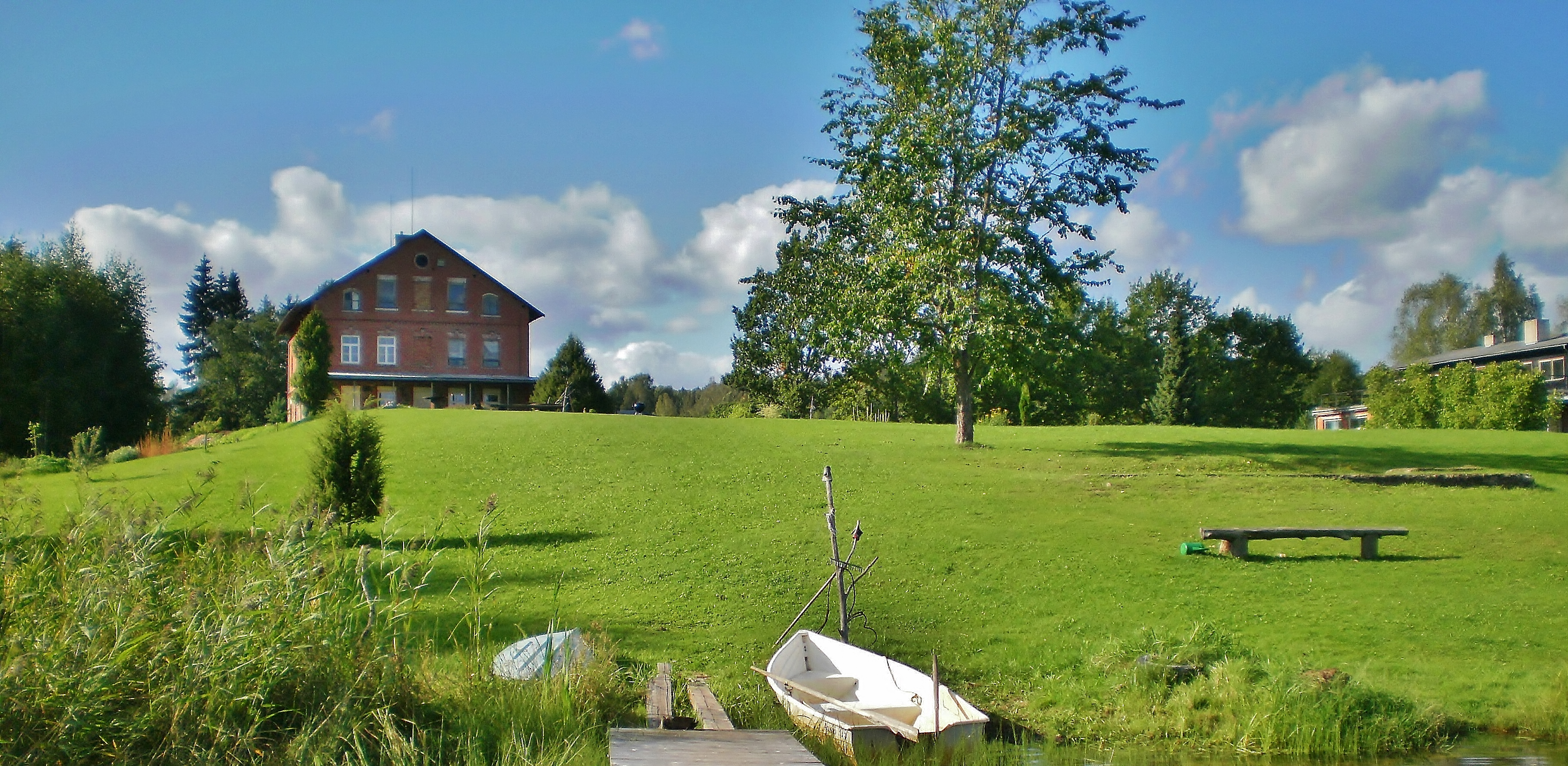 Karula kihelkonnakooli hoone